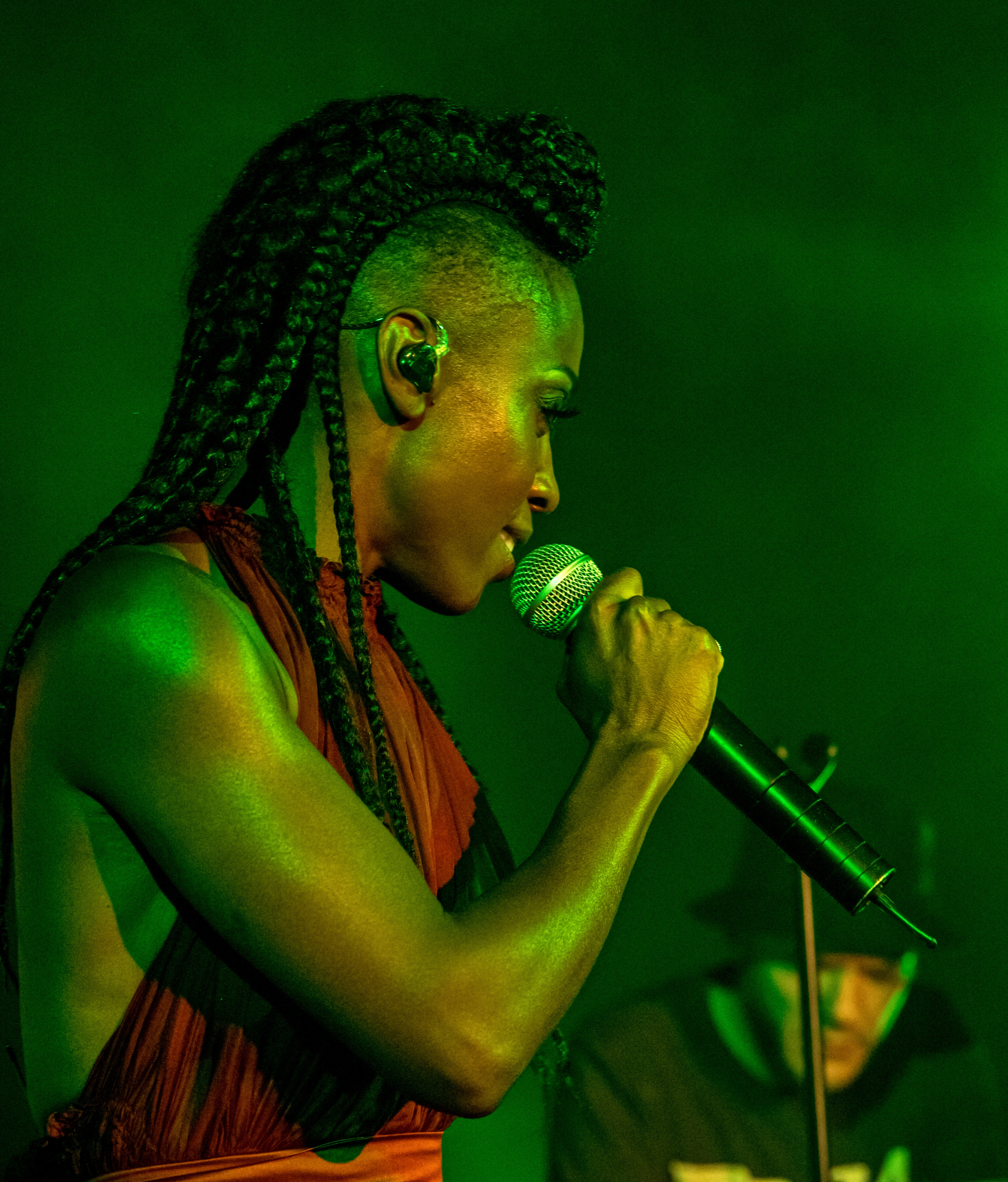 Bilder vom Zelt Musik Festival 2018 in Freiburg im Breisgau Morcheeba Auftritt am 31. Juli 2018 im Speigelzelt